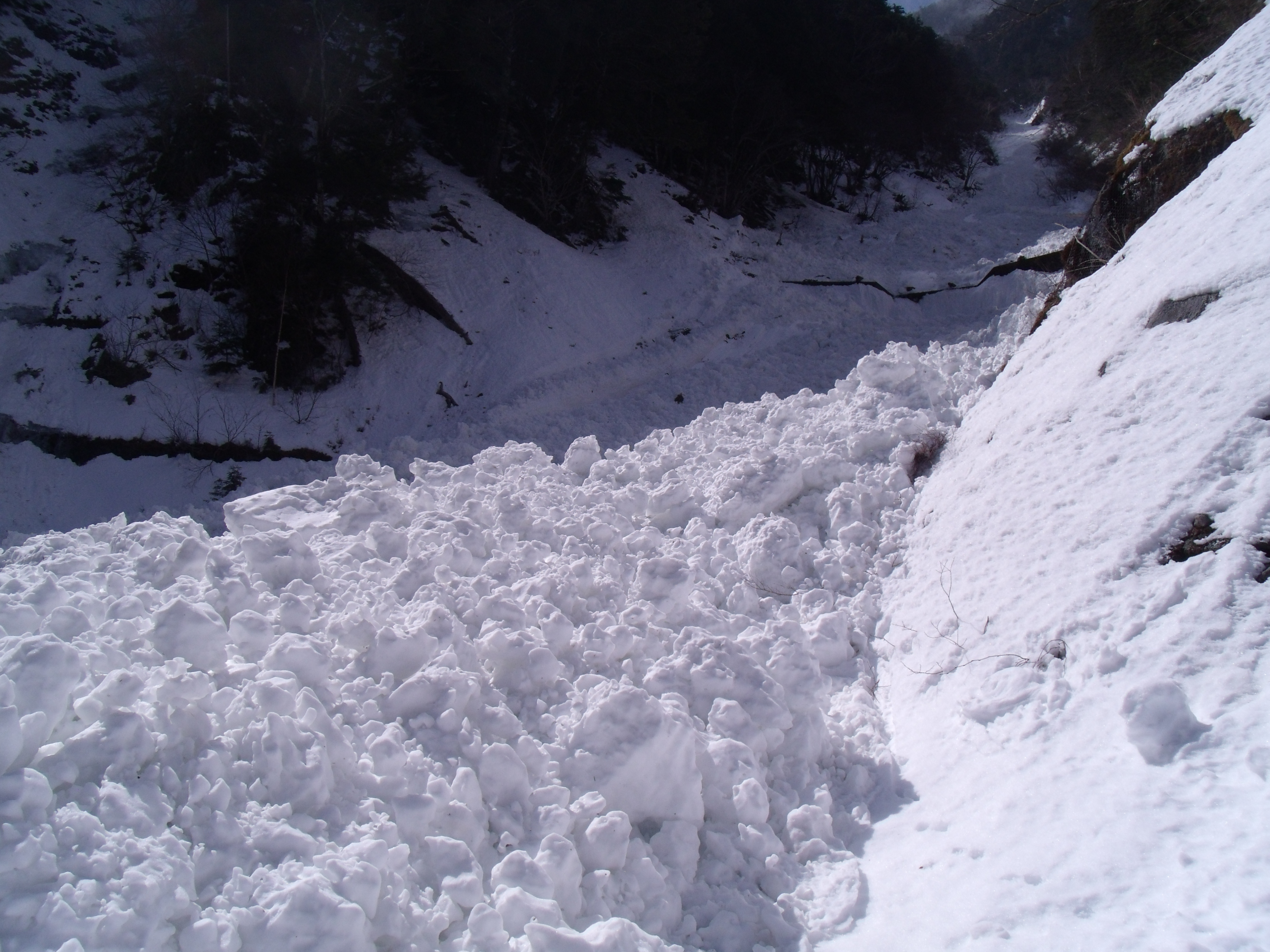 砂防堰堤を越える大規模雪崩（南アルプス平右衛門谷）